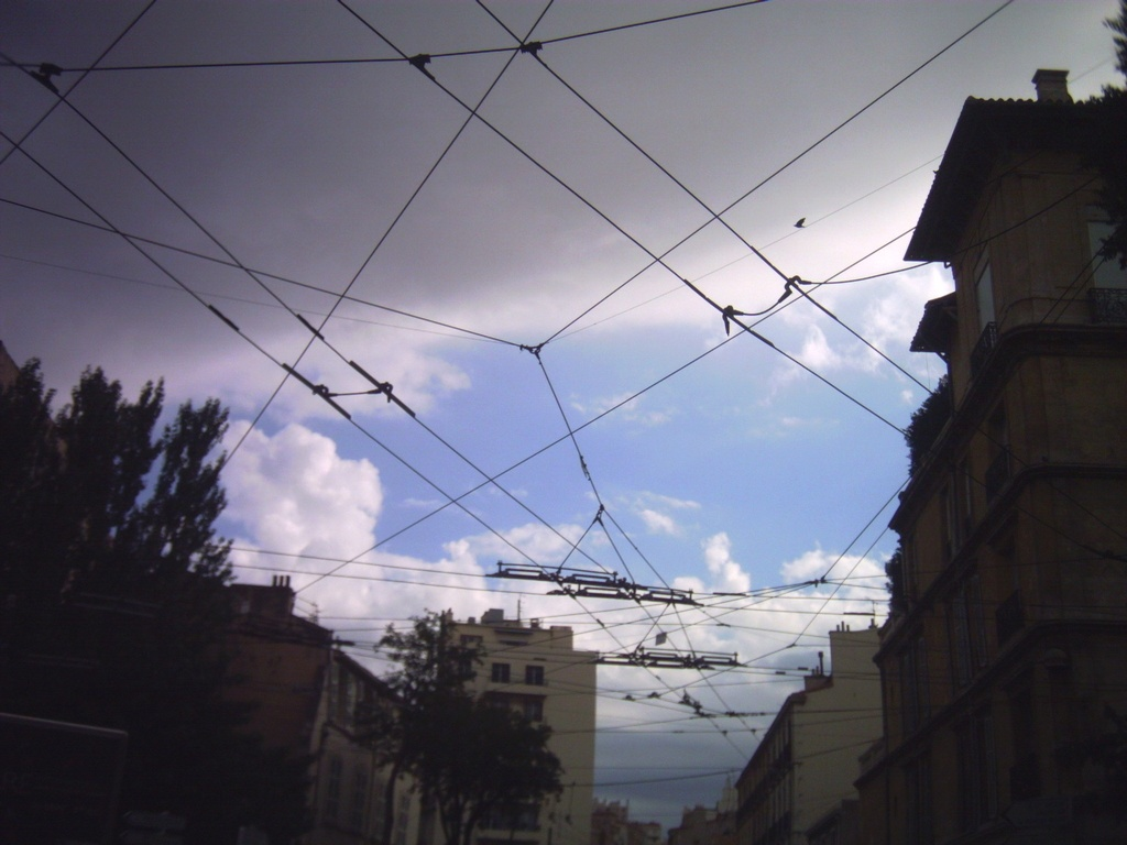 Aiguillage et croisement de bifilaires (inutilisés depuis 2004) au carrefour de Saint-Victor à Marseille.